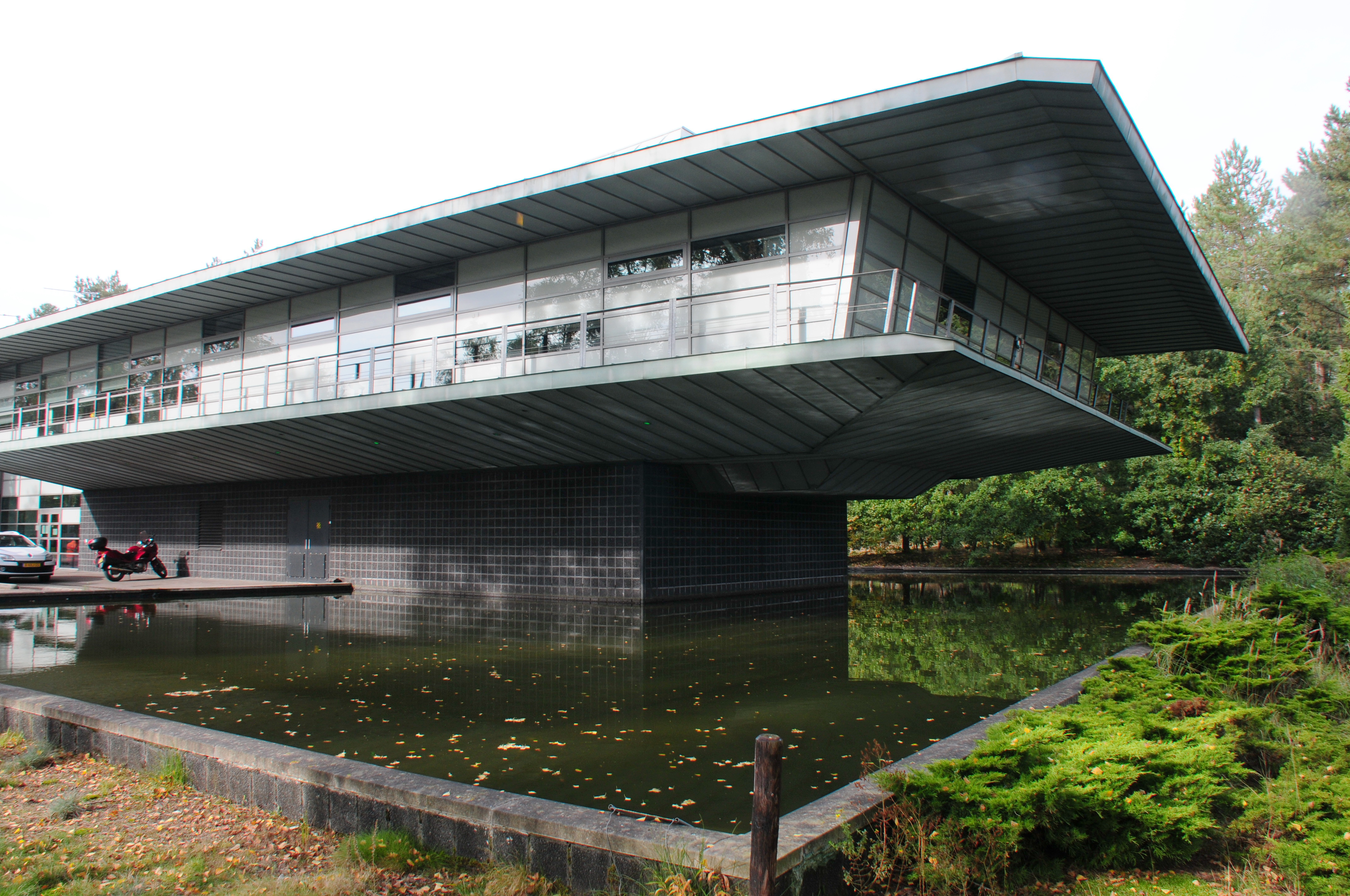 Rijkswaterstaat verkeersregelcentrum Planken Wambuis bij Grijsoord